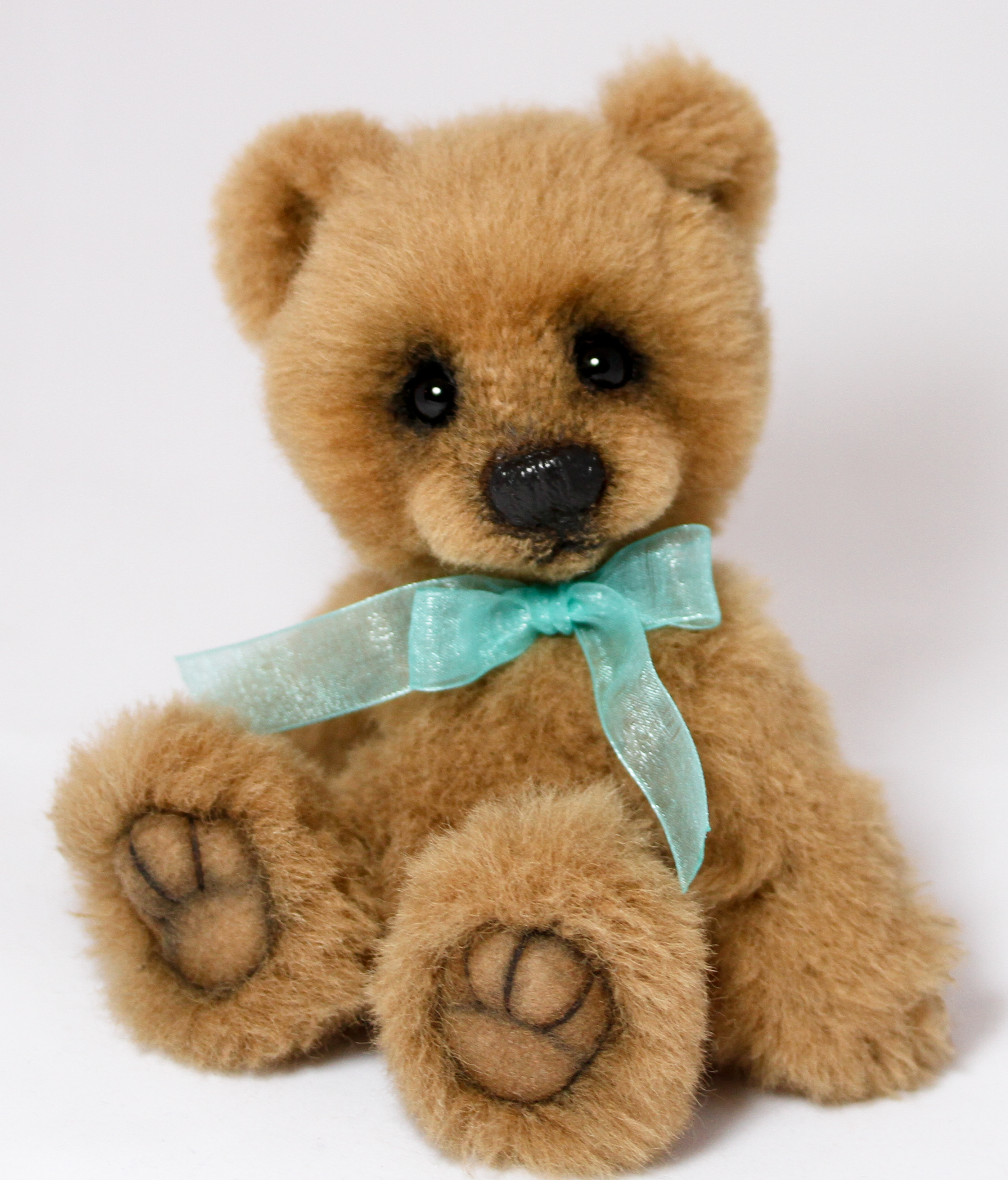 Pierre Despereax 09.19.2012